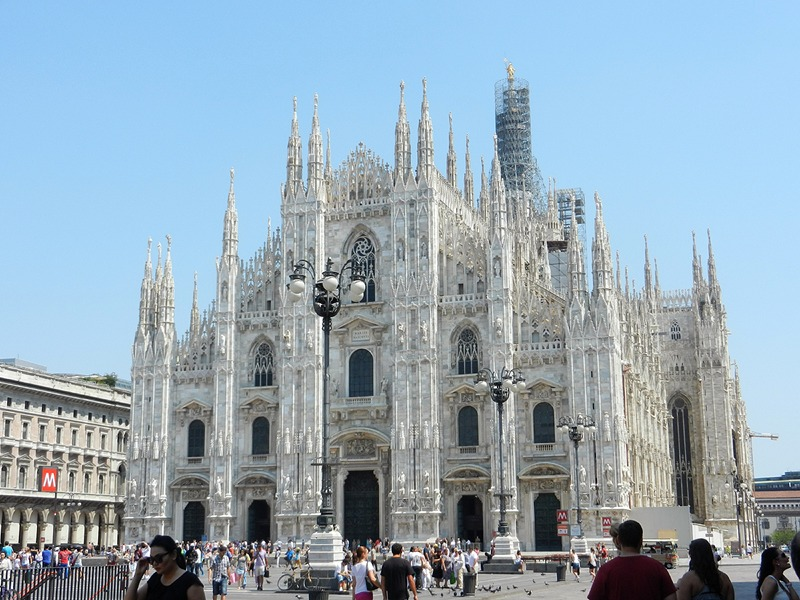 Milano - Duomo